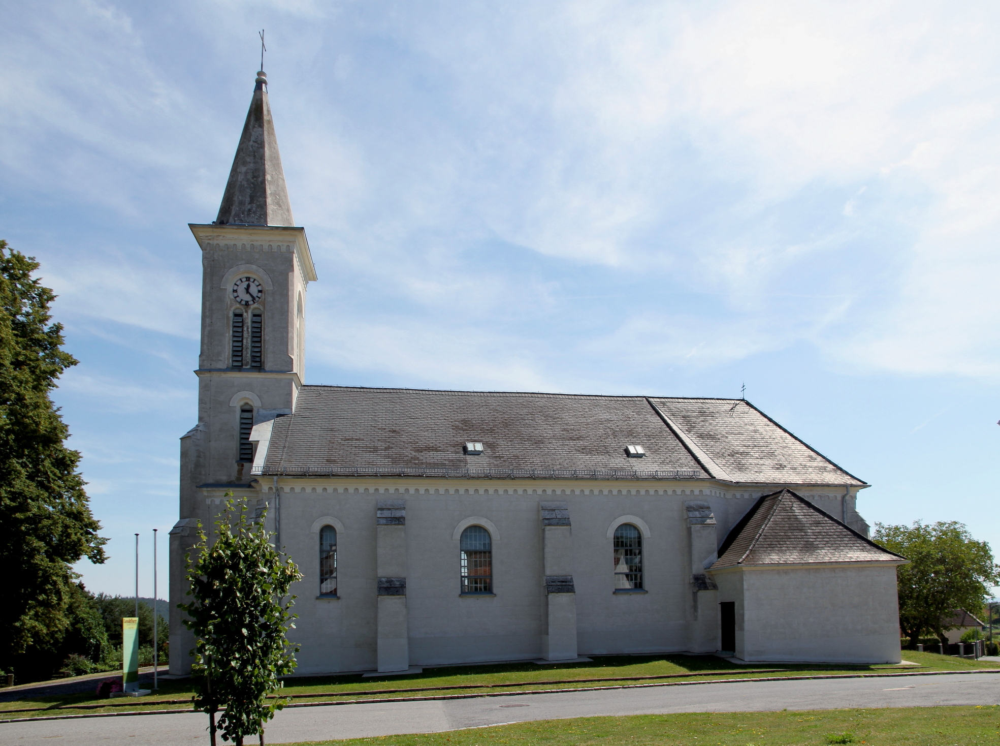 Katholische Pfarrkirche hl. Michael in Landsee, ein Ortsteil der burgenländischen Marktgemeinde Markt Sankt Martin. Ein klassizistischer Sakralbau mit neoromanischen Ergänzungen. Die Kirche wurde im Jahr 1800 errichtet, ist 1897 abgebrannt und wurde 1909 umgebaut.